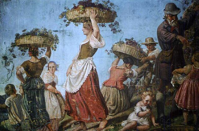 Weinlese in Italien